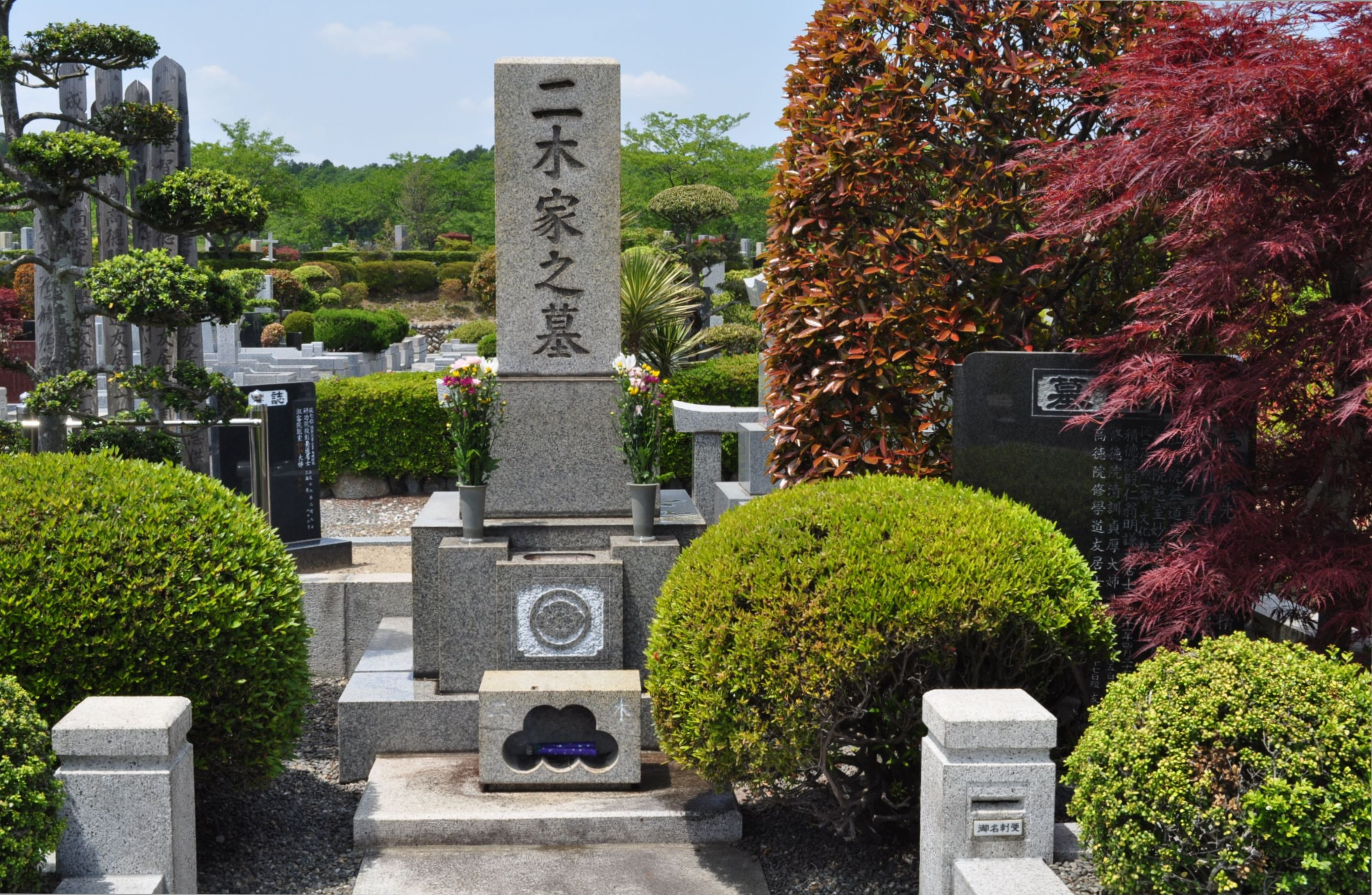 西多摩霊園にある二木謙三と家族の墓碑